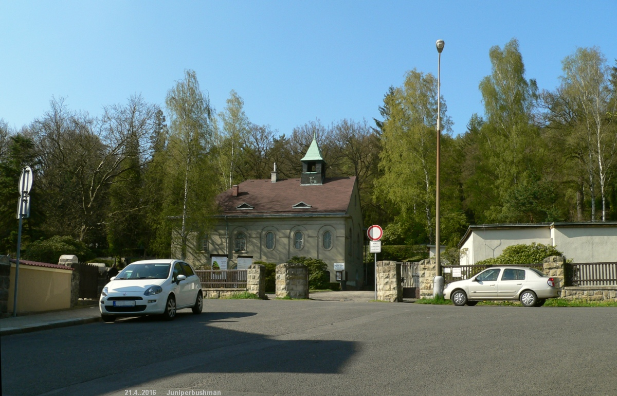 Vchod na hřbitov na Škrabkách